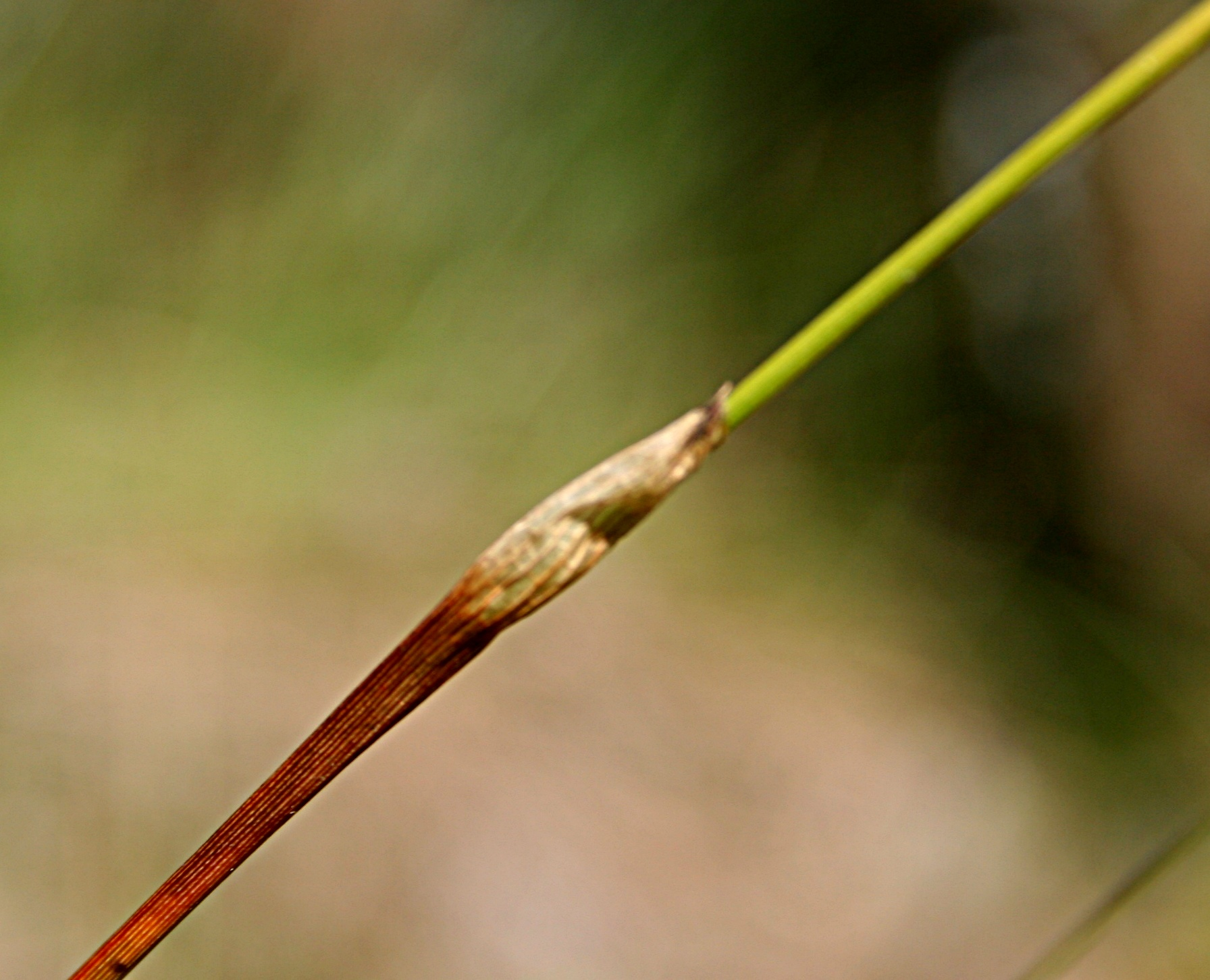 Wełnianka pochwowata w rezerwacie Dury, Wdecki Park Krajobrazowy - pochwa liściowa